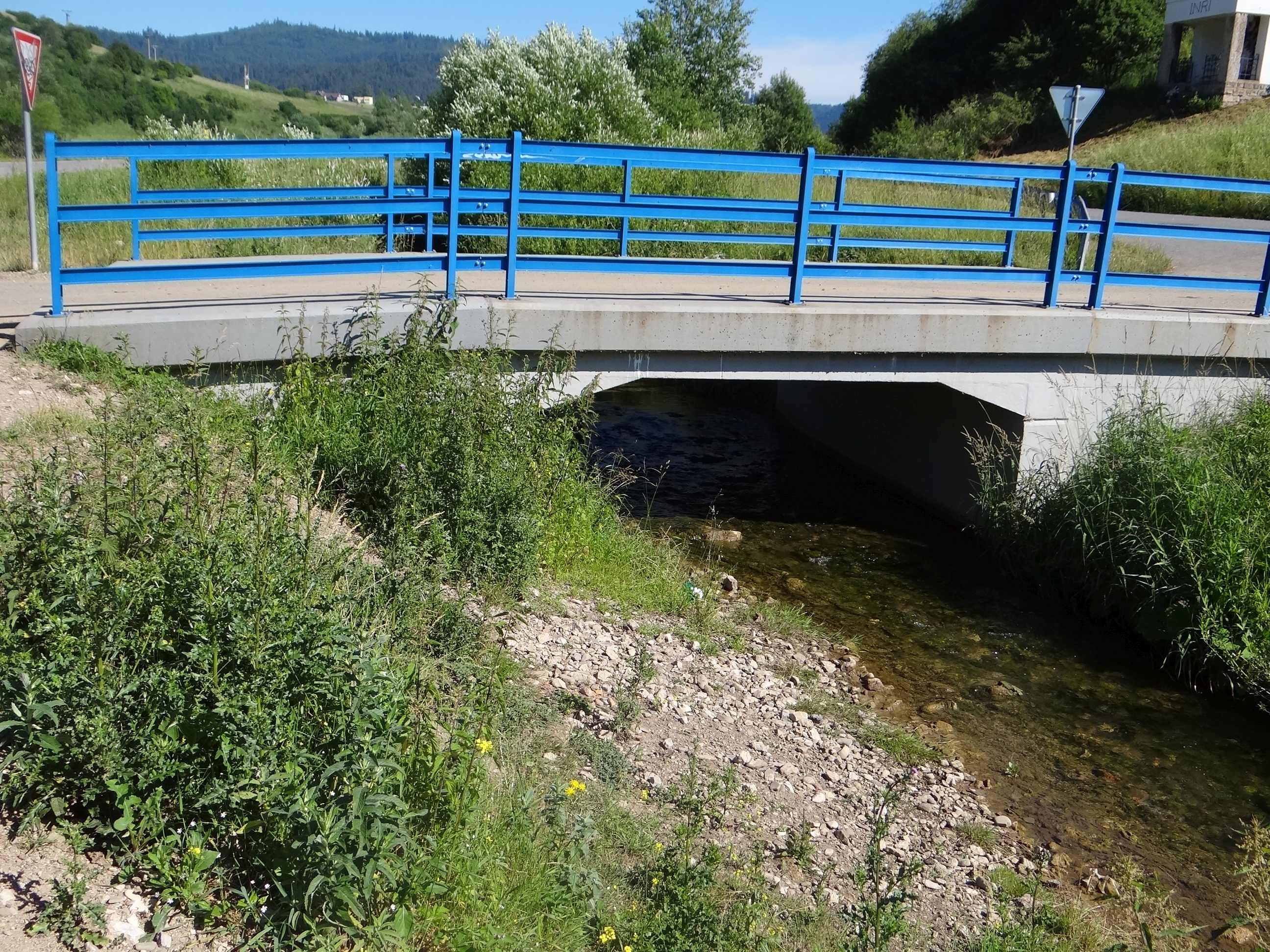 Rieka między miejscowościami Nižné Ružbachy i Vysne Ružbachy